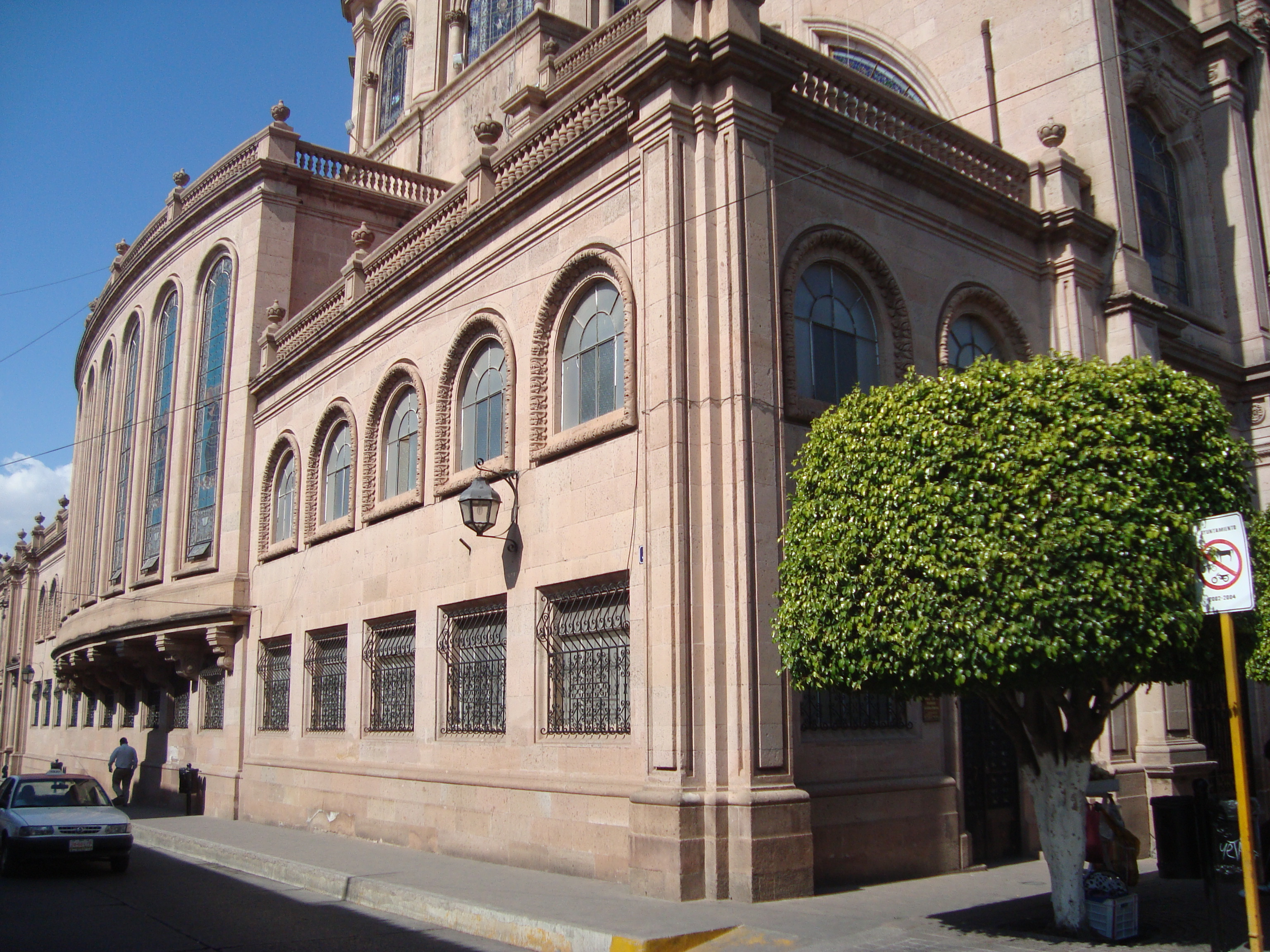 Vista posterior del Santuario del Señor de La Piedad, La Piedad Michoacan, Mexico